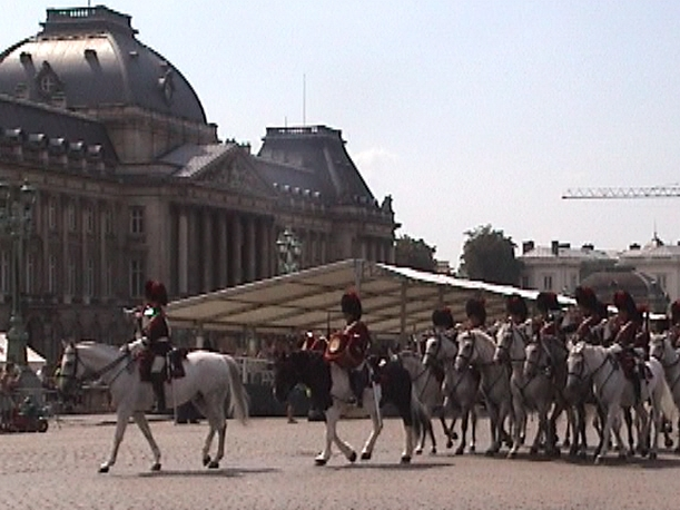 Corps des trompettes et du timbalier de l'escorte royale (Belgique)